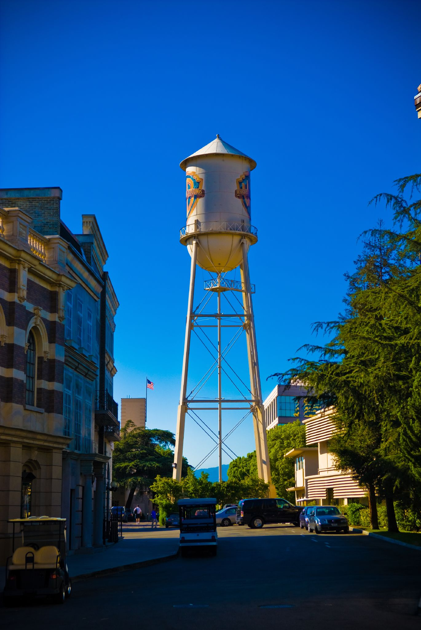 La tour d'eau de Warner Bros